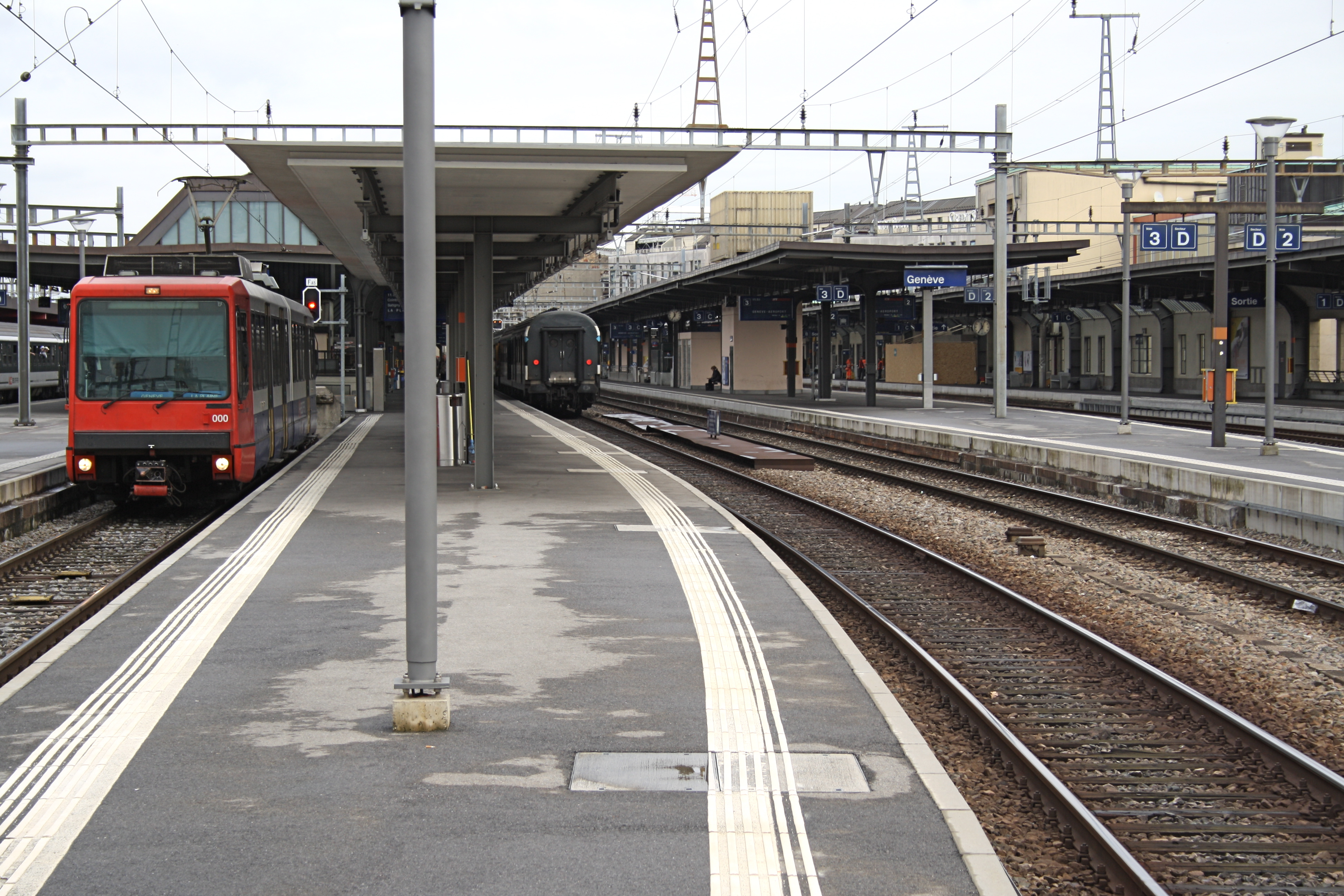 Gare de Genève-Cornavin